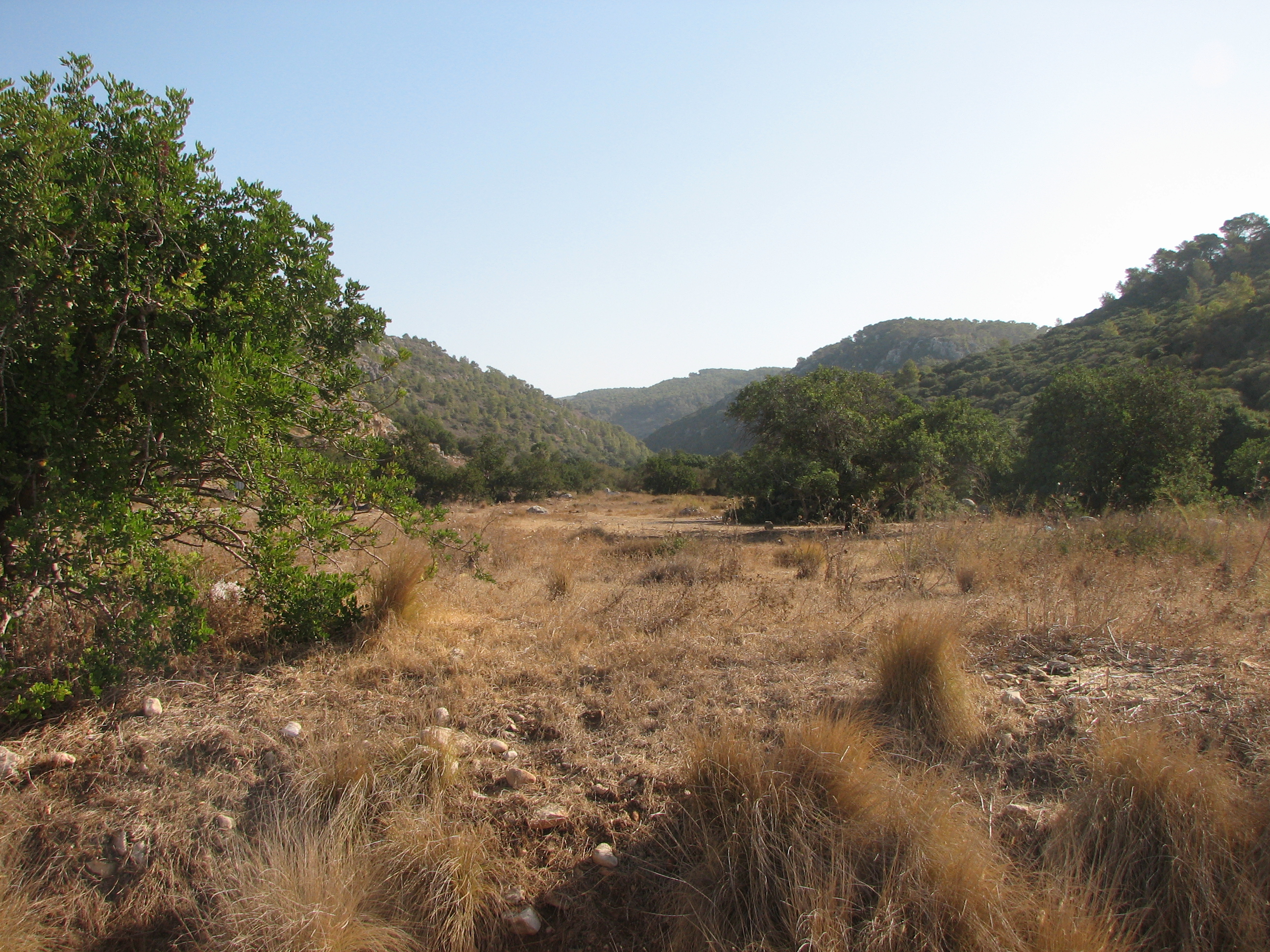 Oren Wadi - Mount Carmel Israel נחל אורן זורם בהר הכרמל מבט ממוצא הנחל ליד כביש 4 מזרחה לכוון הנחל